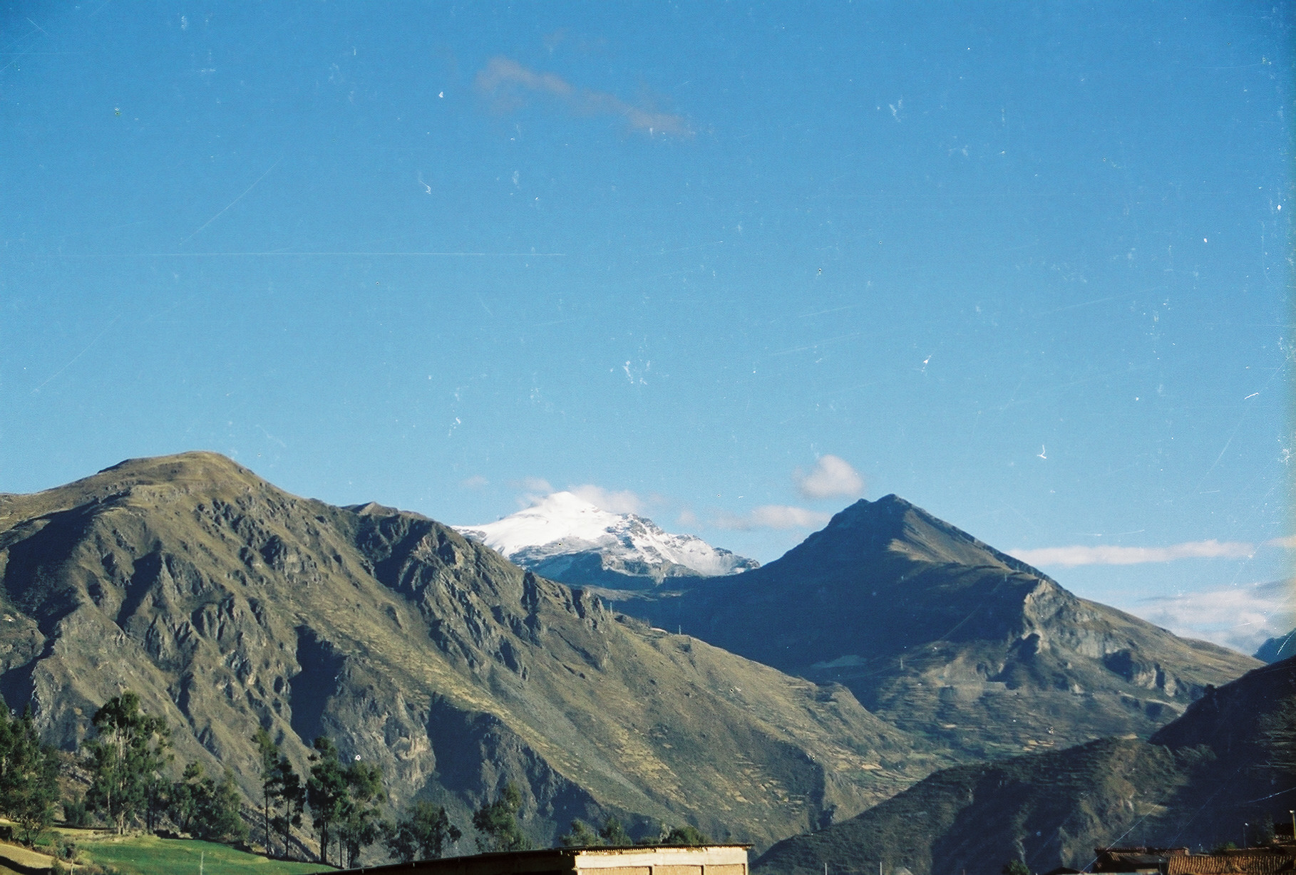 schneebedeckter Berg in der Cordillera Negra, Departament Ancash/Peru von Valle de Pativilca aus gesehen. 2001 von Uta Freund